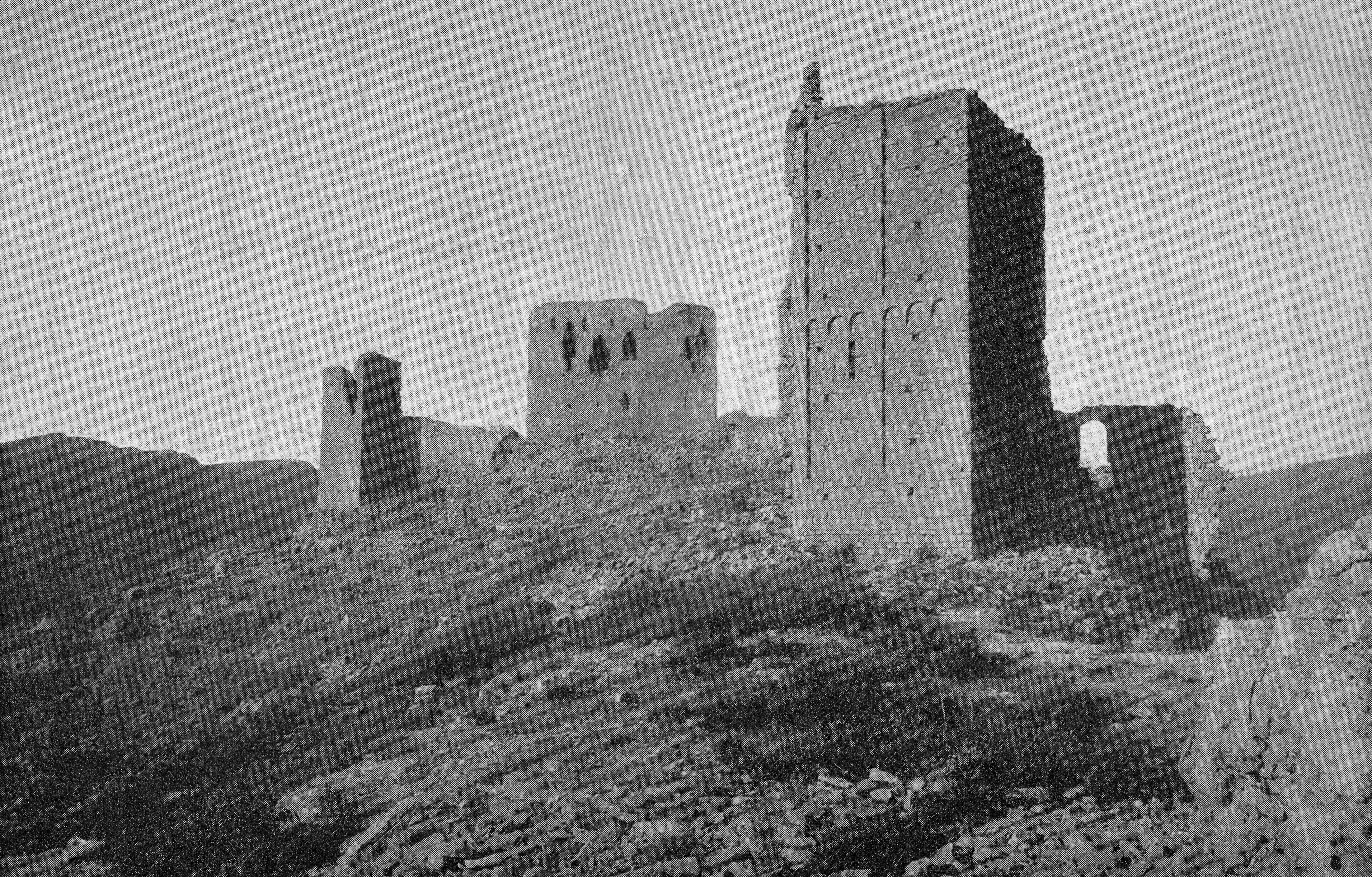 Castell de Llordà. Imatge de fa més de cent anys (Isona i Conca Dellà, Pallars Jussà)